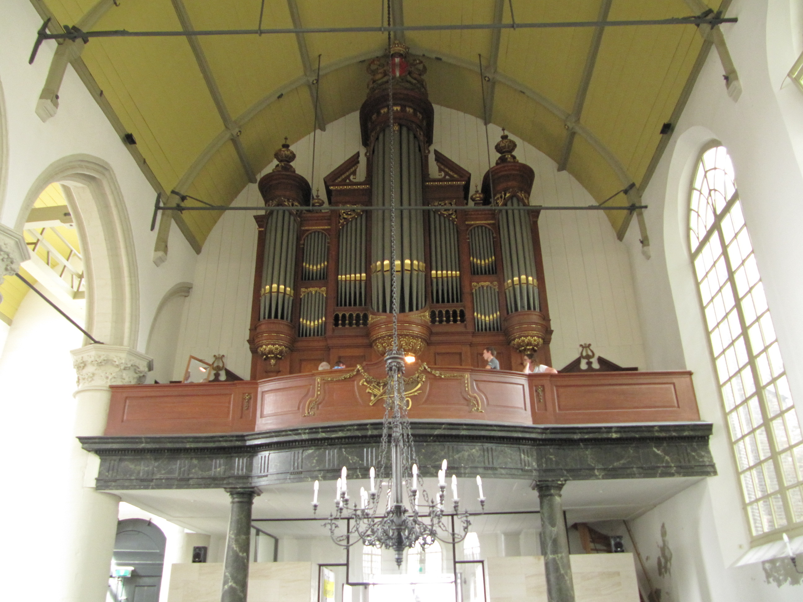 RM13885 Dordrecht - Voorstraat 216 (foto 2).jpg